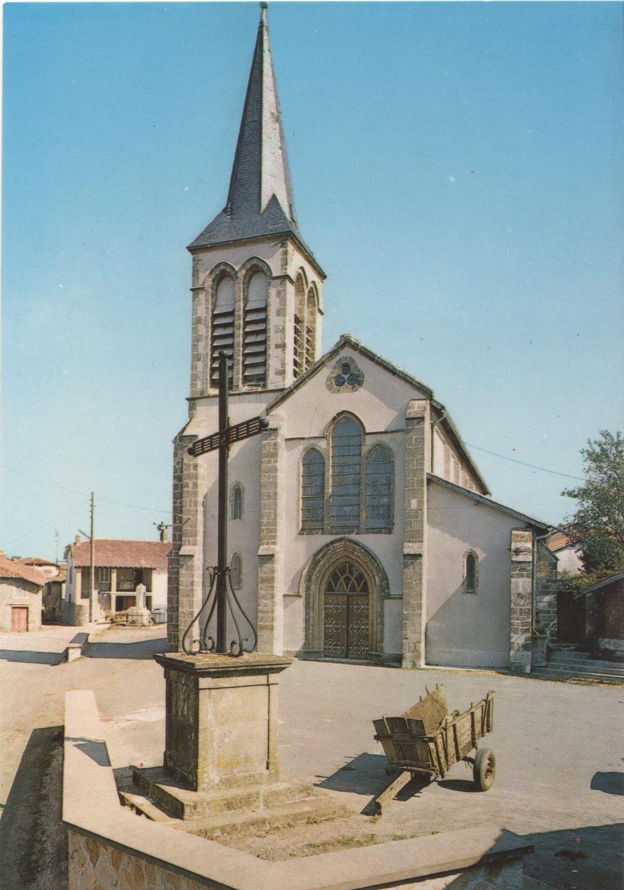 carte postale des années 1980 représentant l'église St Michel de Montredon (46)